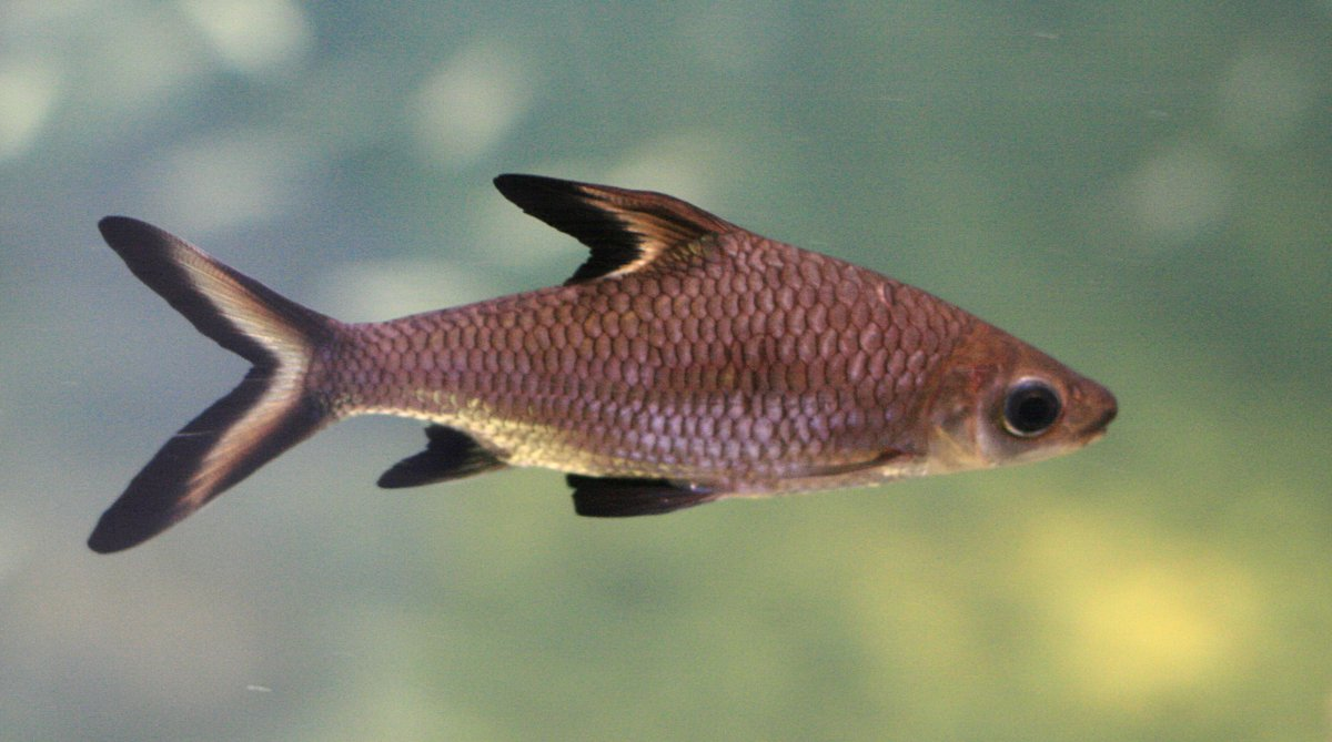 Bala shark Balantiocheilos melanopterus